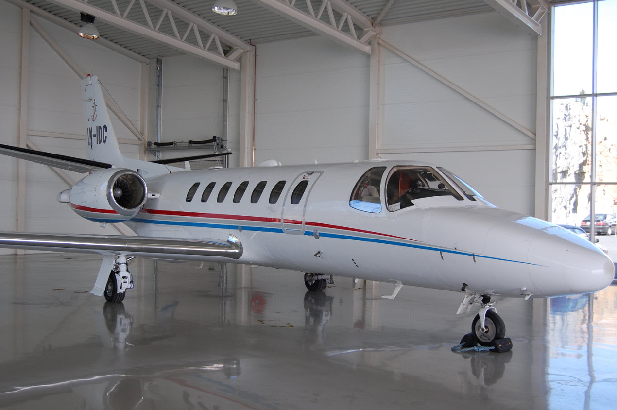 LN-IDC i Hangaren på Torp